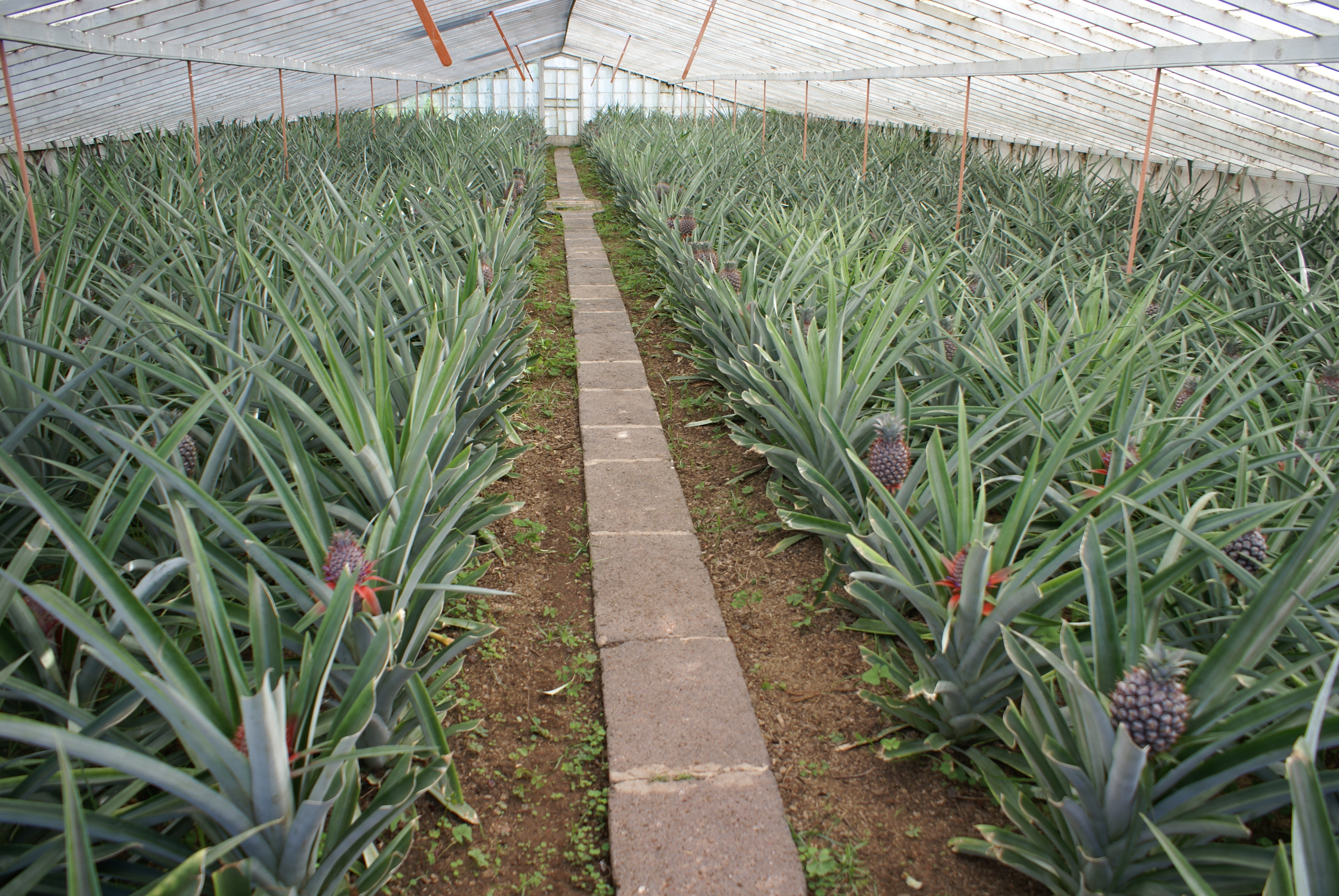 Estufa de Ananás, Fajã de Baixo, Ponta Delgada, ilha de São Miguel, Açores